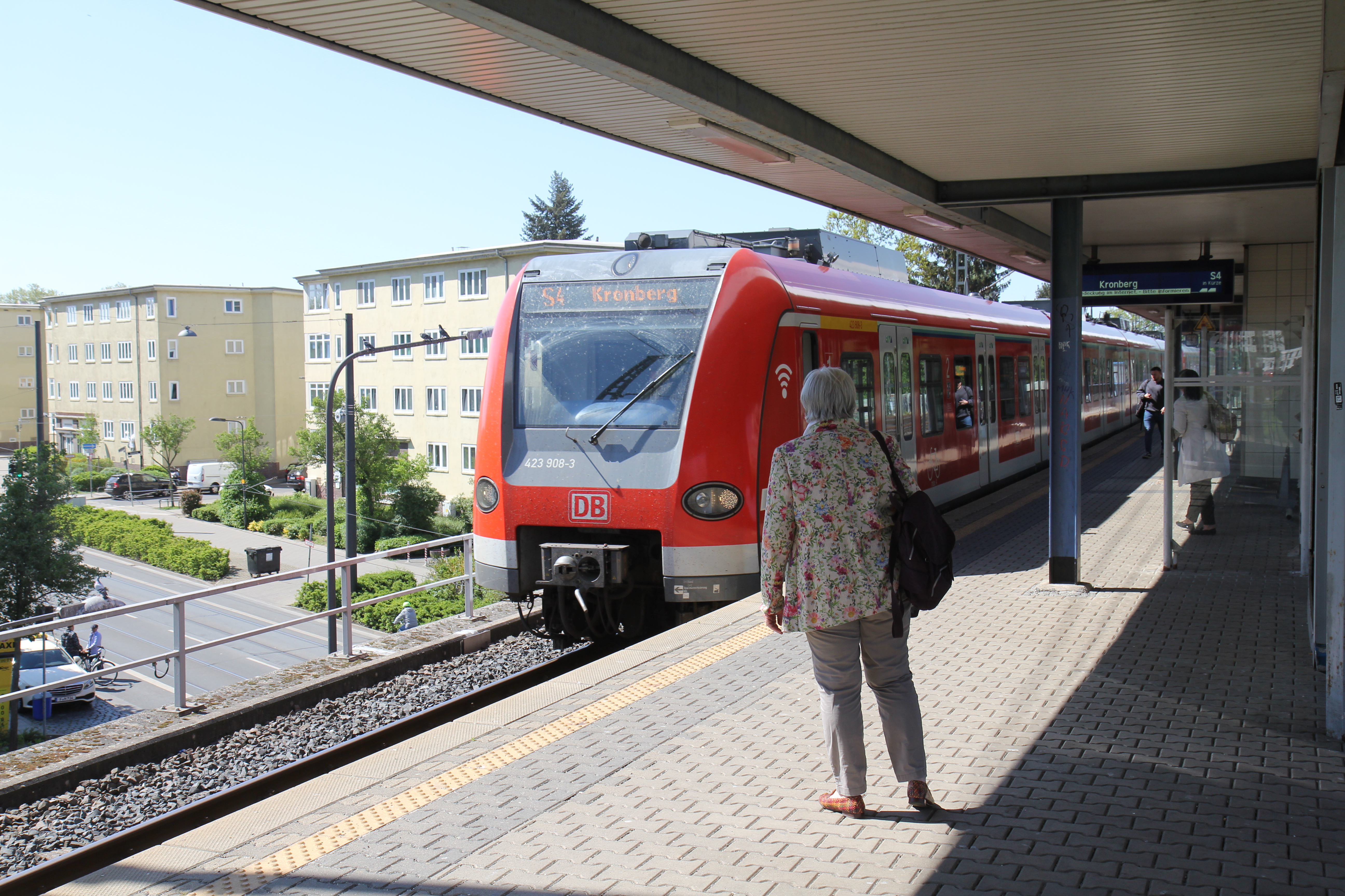 Verkehrsstation Frankfurt Stresemannallee: S-Bahn, Tram, und Bus